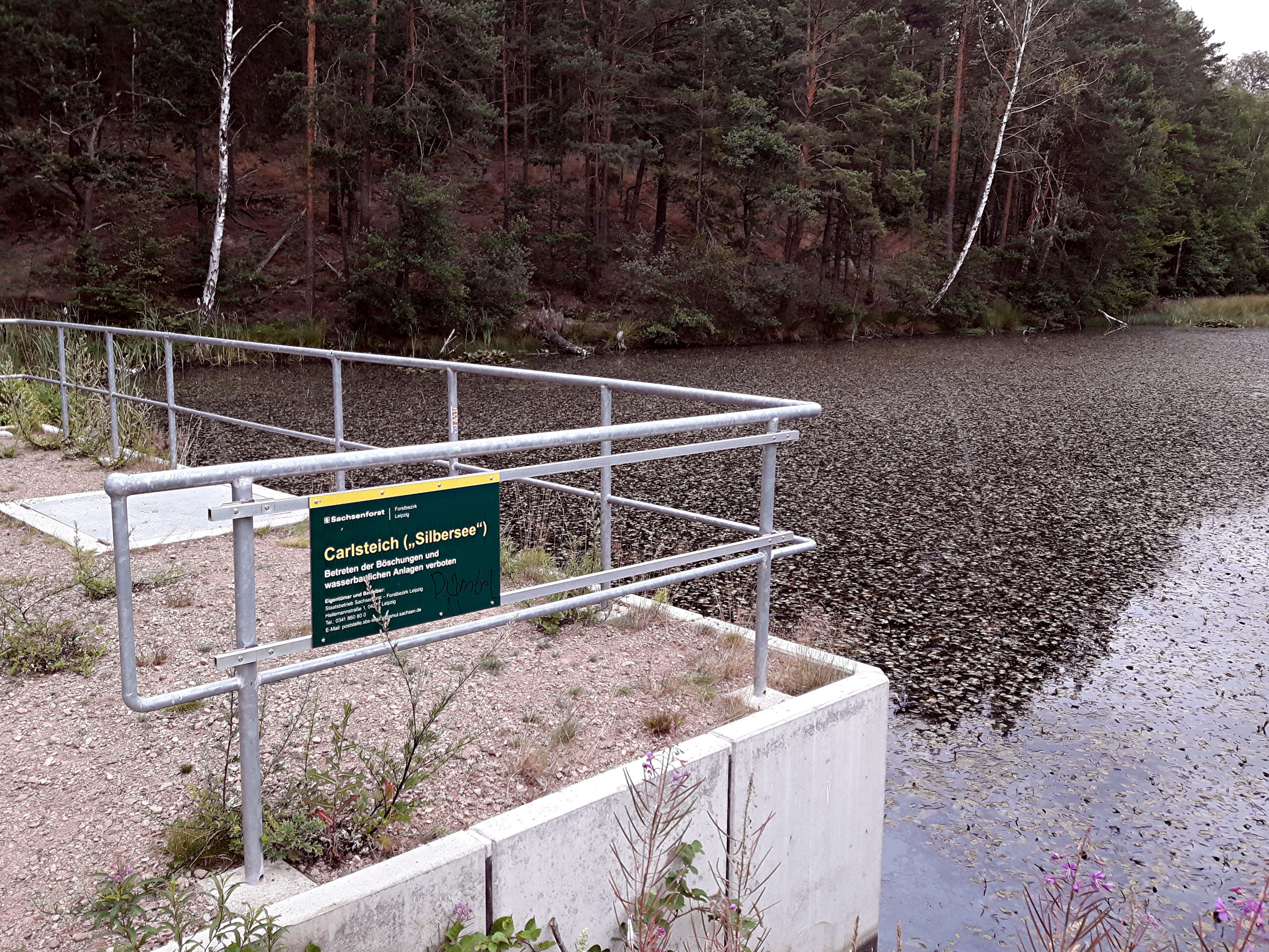 Blick auf den Carlsteich (Silbersee) im Wermsdorfer Forst